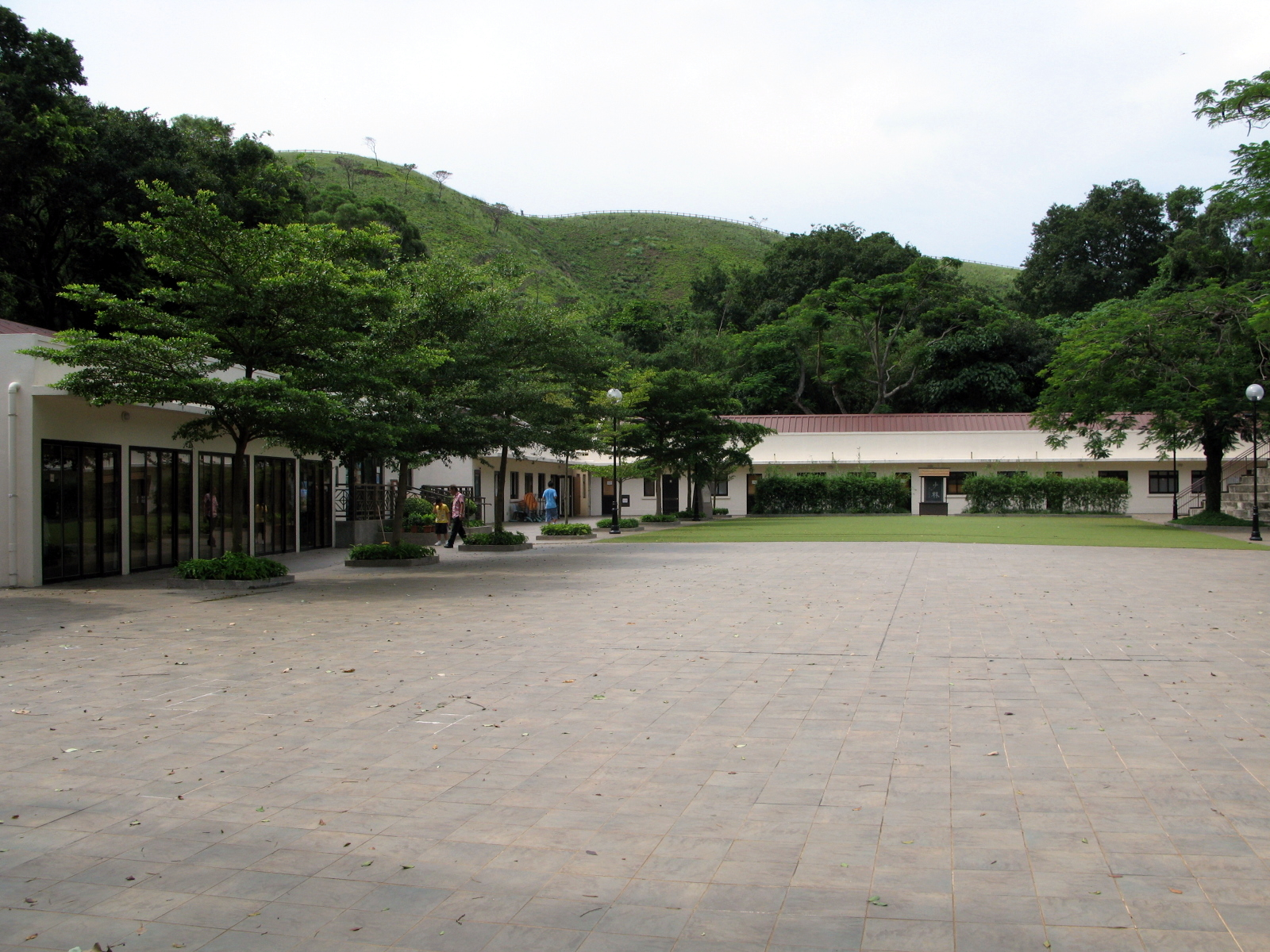 Tai O Shaolin Wushu Culture Centre 大澳少林寺武術學校